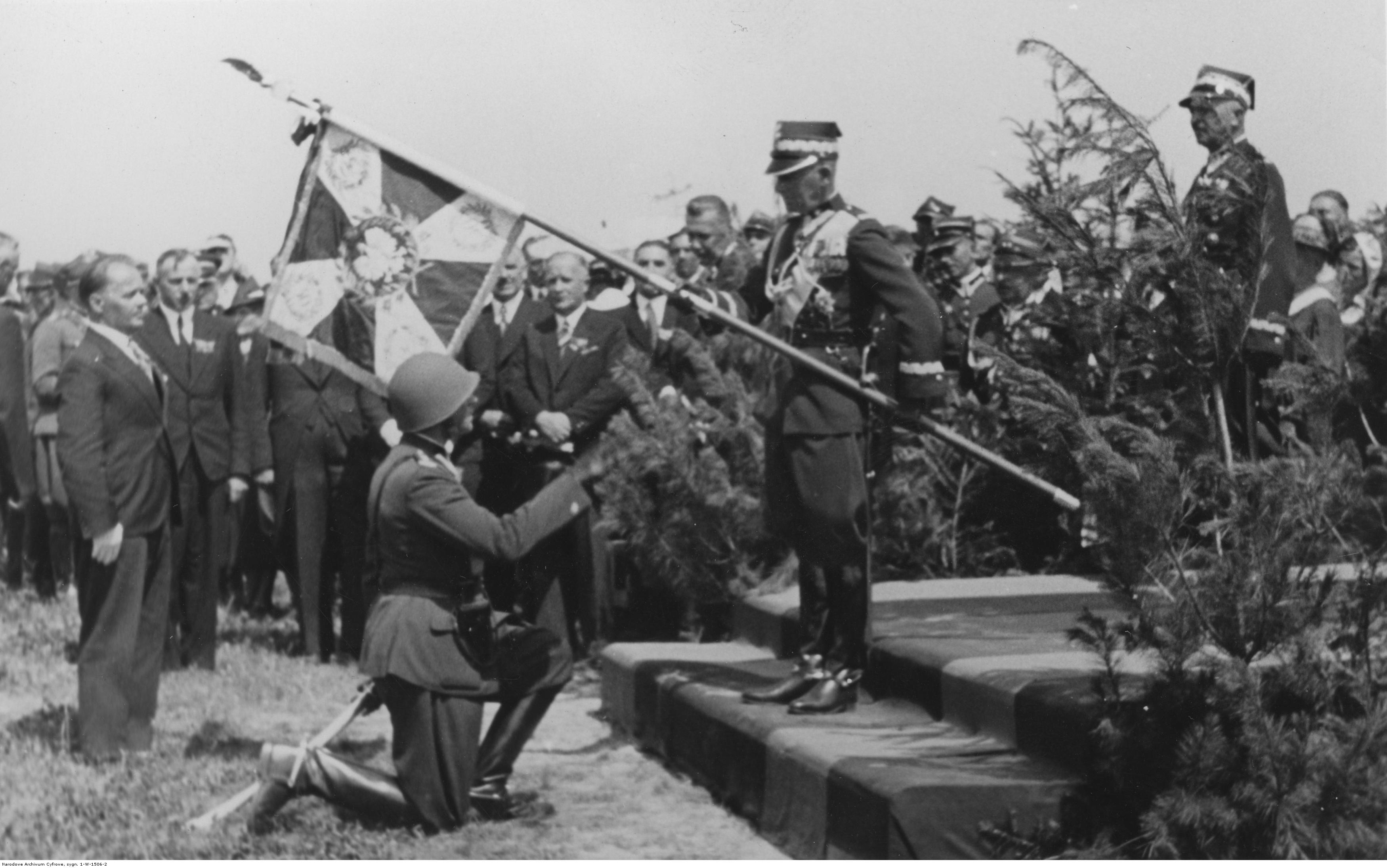 Wręczenie sztandaru 30. Pułkowi Artylerii Lekkiej z Brześcia na lotnisku w Zamościu 17 lipca 1938 r. Marszałek Edward Śmigły-Rydz wręcza dowódcy pułku płk. dypl. Jerzemu Aleksandrowi Zawiszy sztandar pułku. Koncern Ilustrowany Kurier Codzienny - Archiwum Ilustracji. Sygnatura: 1-W-1506-2